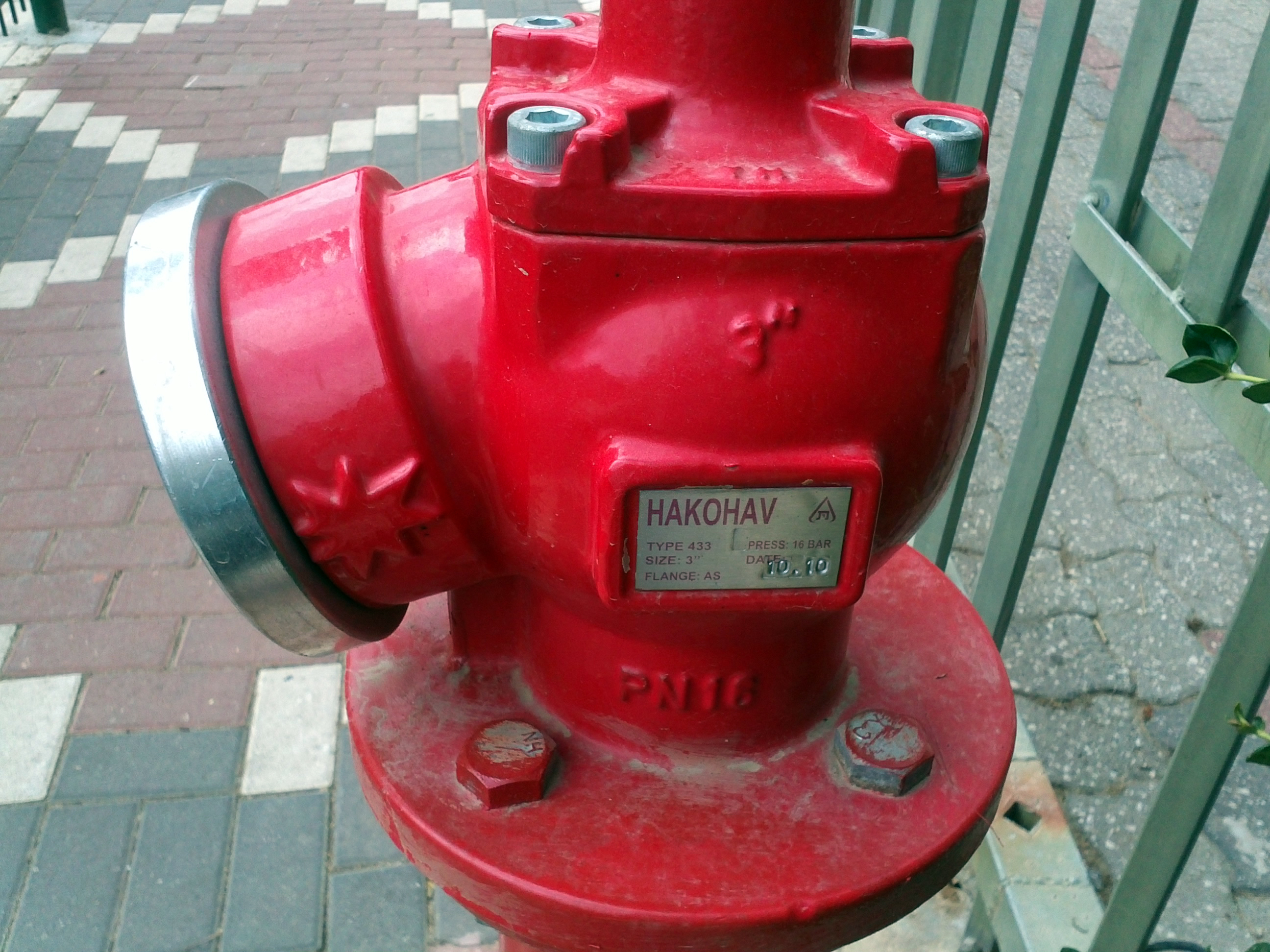 Пожарный гидрант в Петах-Тикве